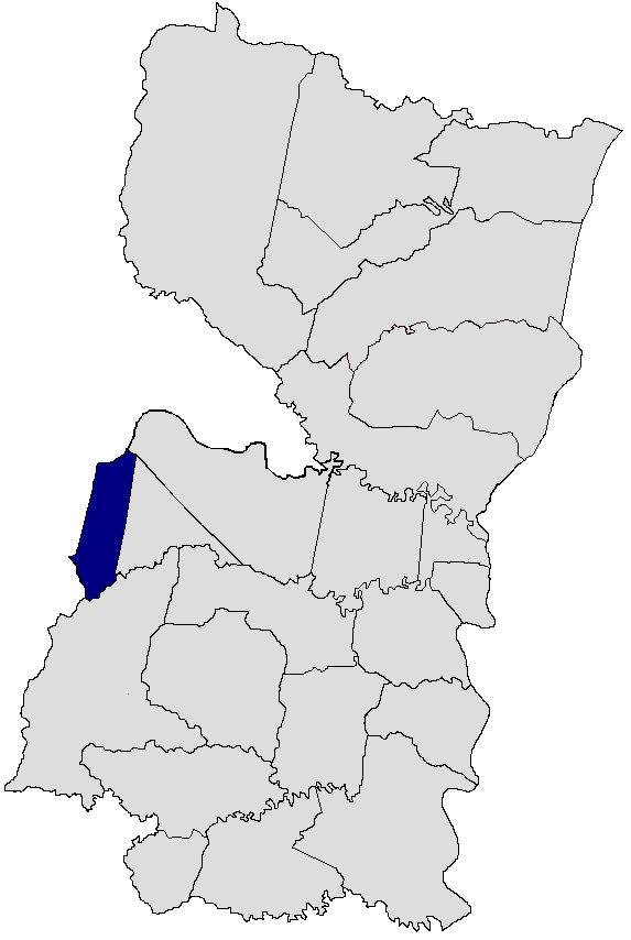 Juan Emilio Oleary